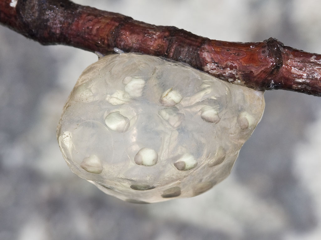 Santa Rosa Creek, San Luis Obispo Co, CA April 4